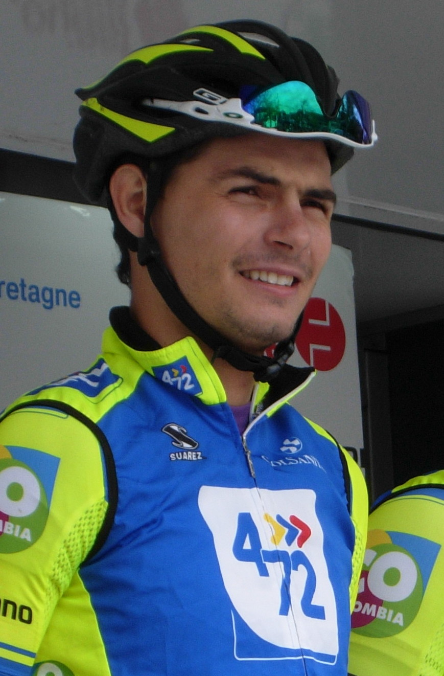 Tour de Bretagne 2013 - Présentation des équipes au départ de la deuxième étape à Ploemel - Équipe 472-Colombia Depicted person: Sebastián Salazar